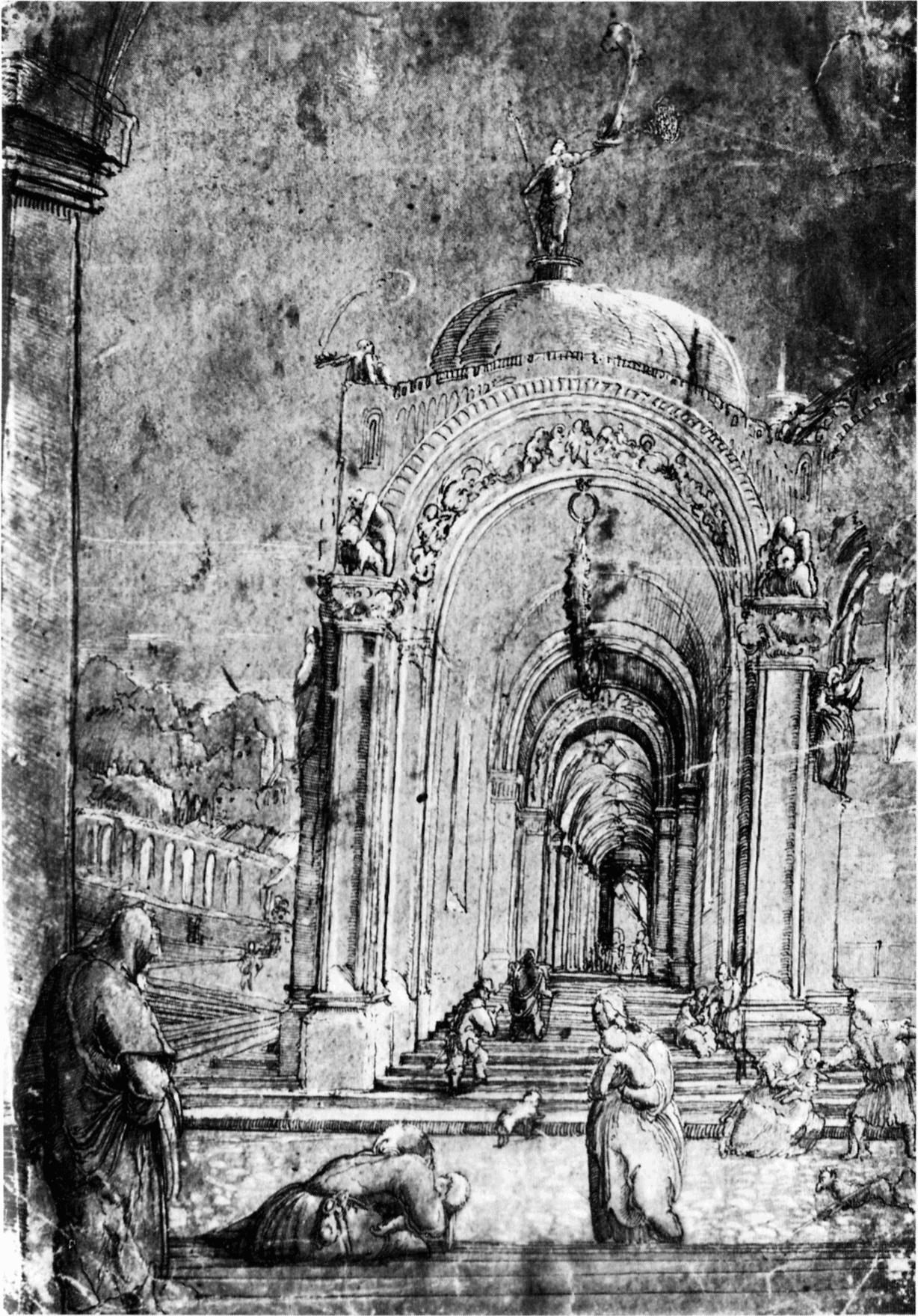 Der Kindermord von Bethlehem. black pen on paper. 18.4 × 13.1 cm (7.2 × 5.1 in). Rotterdam, Museum Boijmans Van Beuningen. Koenigs collection.